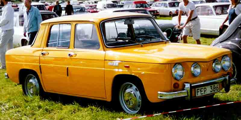 Renault R8 1130 1963